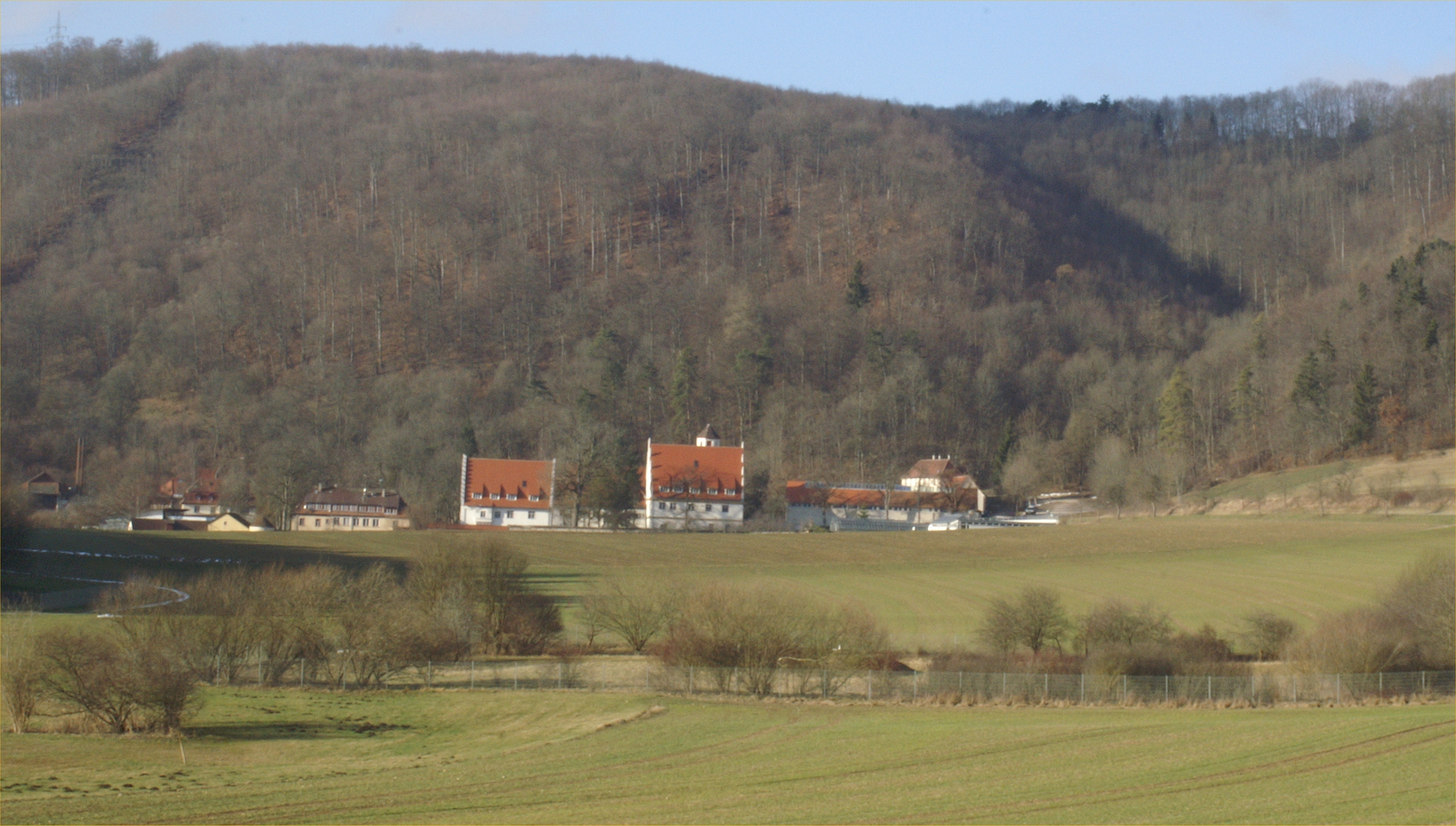 Urspringschule in Schelklingen